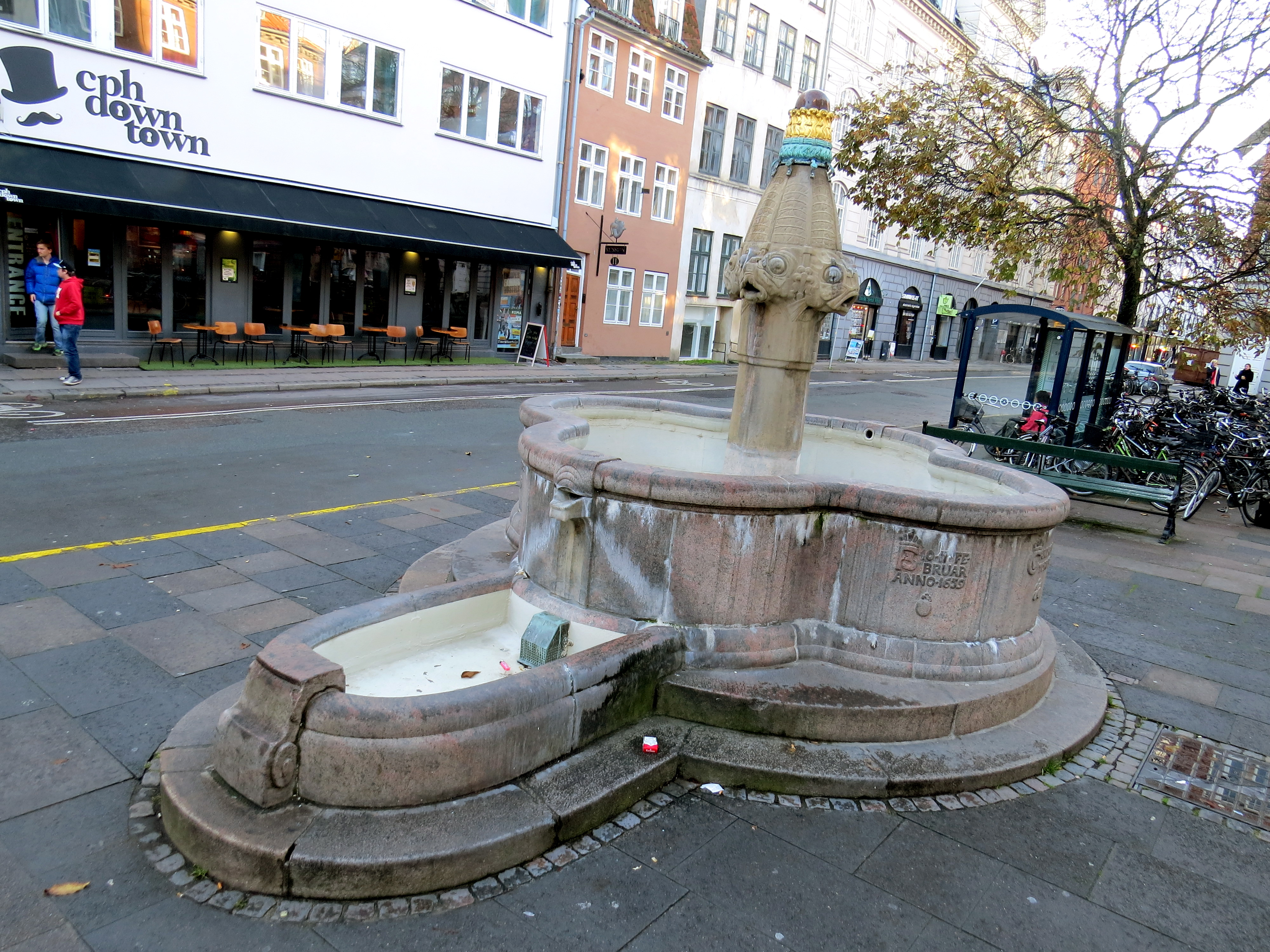 Vandkunsten af Johannes Magdahl Nielsen (1862-1941), opstillet 1910 på torvet Vandkunsten i København